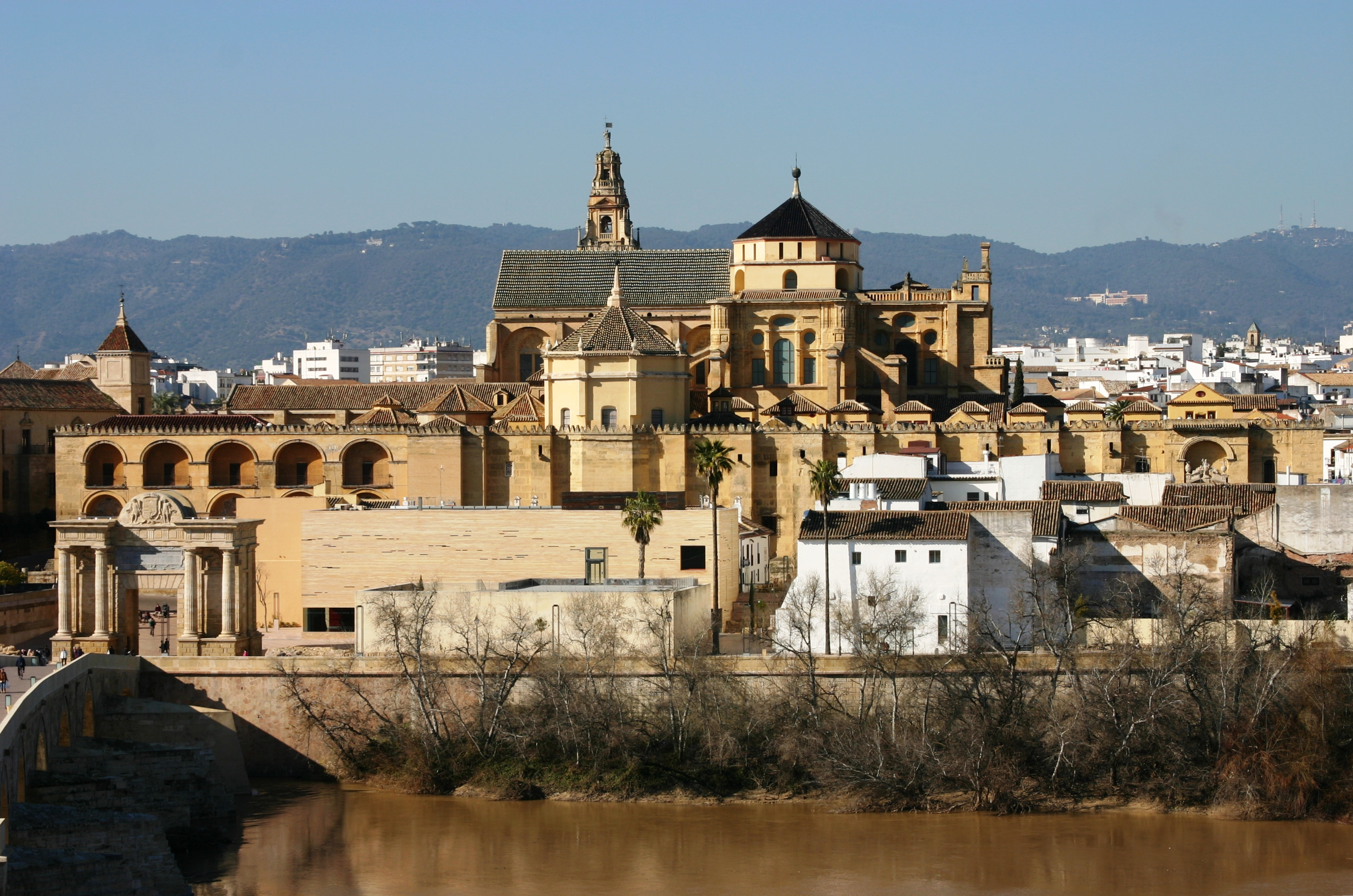 La Mezquita